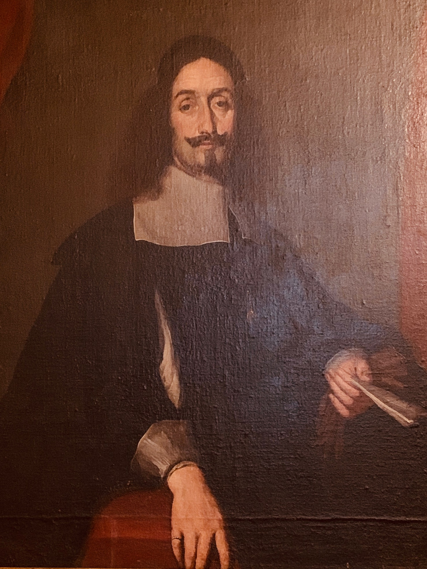 Il quadro della fine del 'XVII secolo rappresenta Giovanni Ferdinando, il primo principe di Porcia e Brugnera.